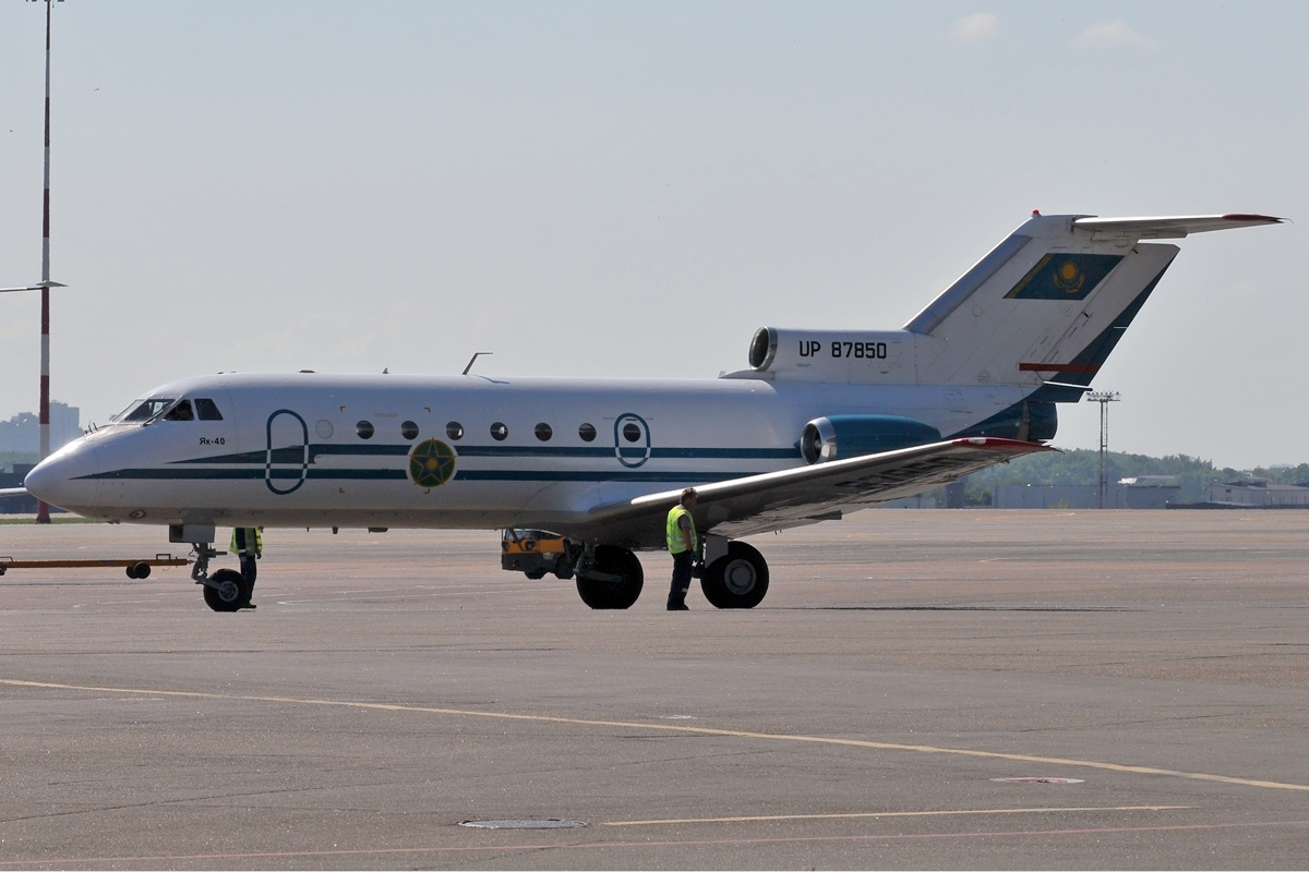 Kazakhstan Border Guards Yakovlev Yak-40